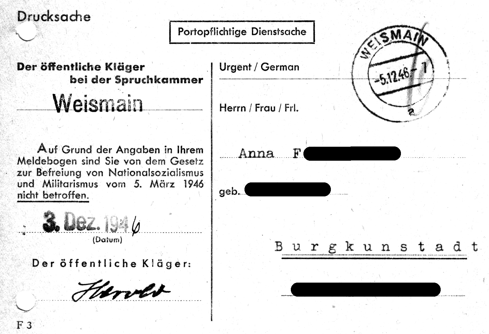 "Persilschein" einer aus Burgkunstadt stammenden Frau